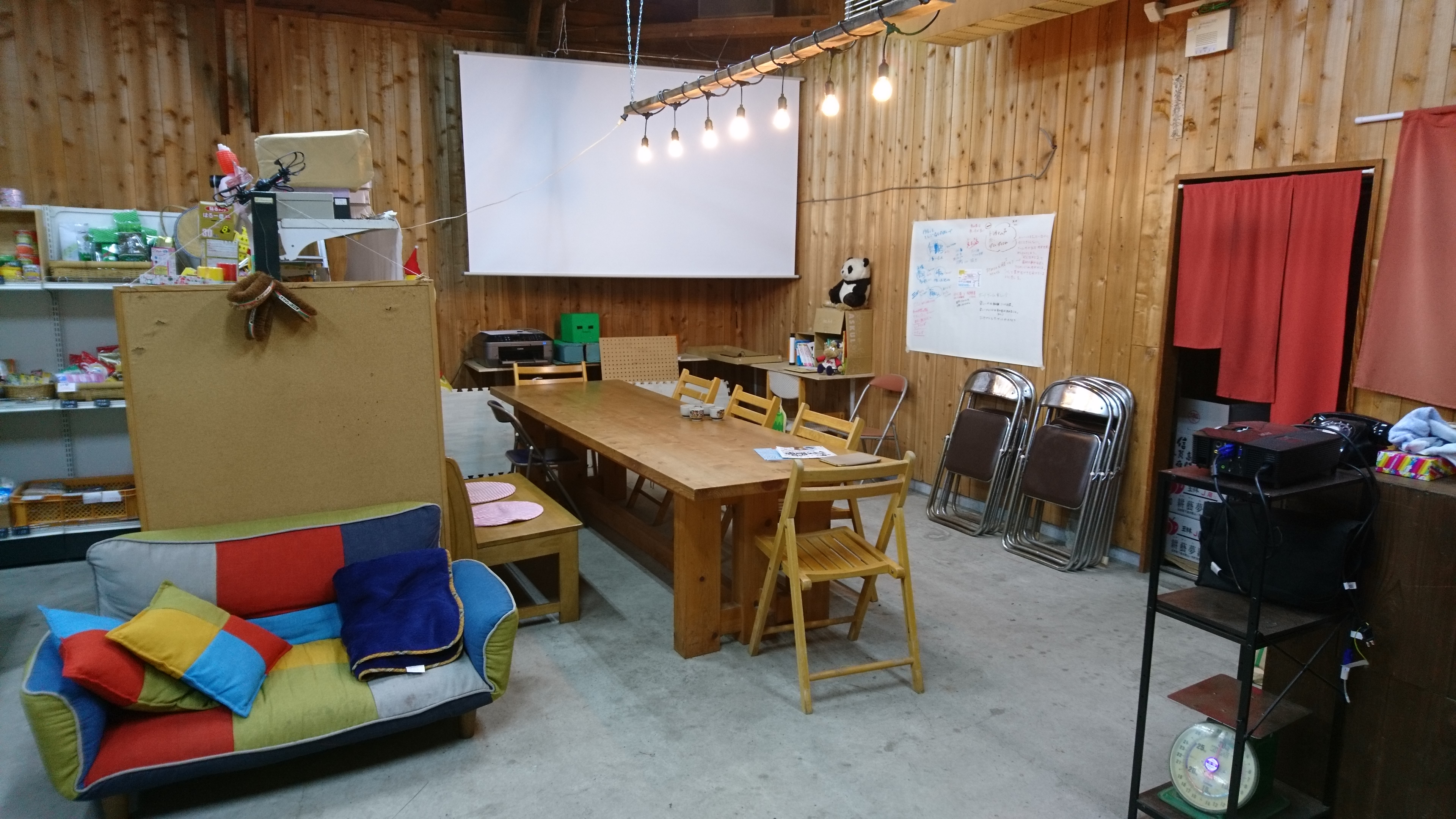 京丹後市大宮町にある「チャレンジ！つねよし百貨店」の店内にあるコミュニティスペース